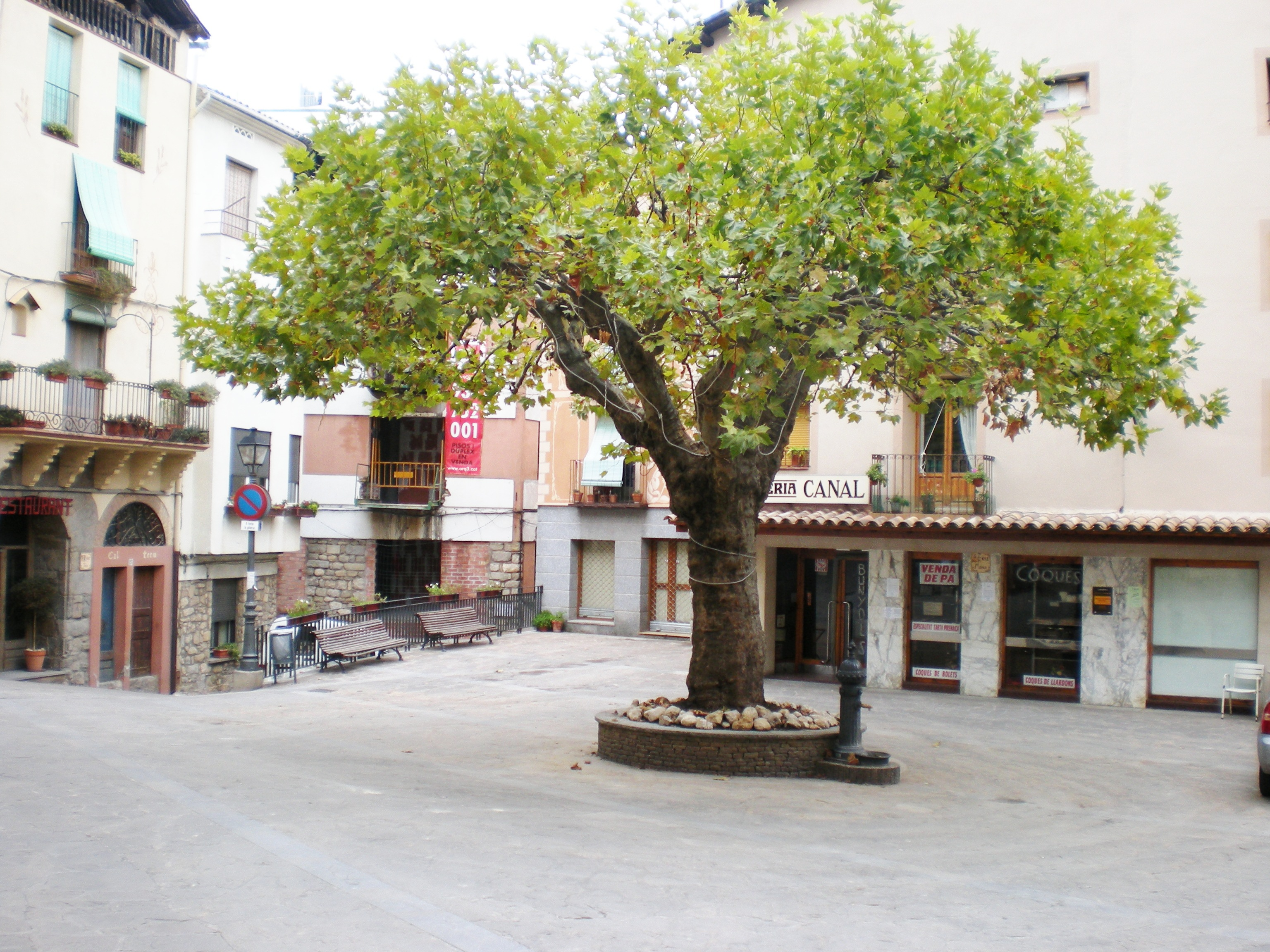 Font de la Plaça Major de la vila de Sant Llorenç de Morunys (Solsonès)